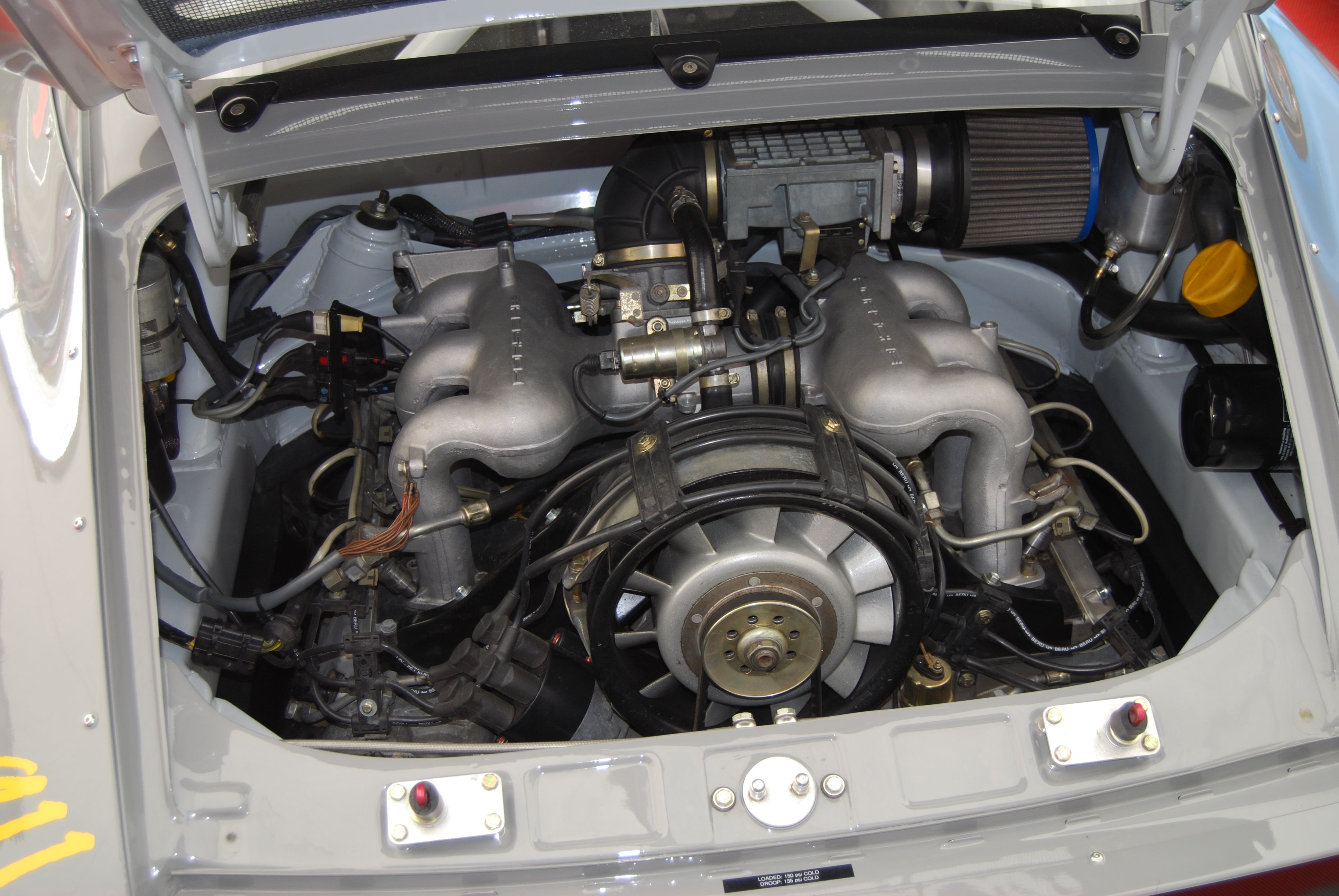 1c1_DSC_0497